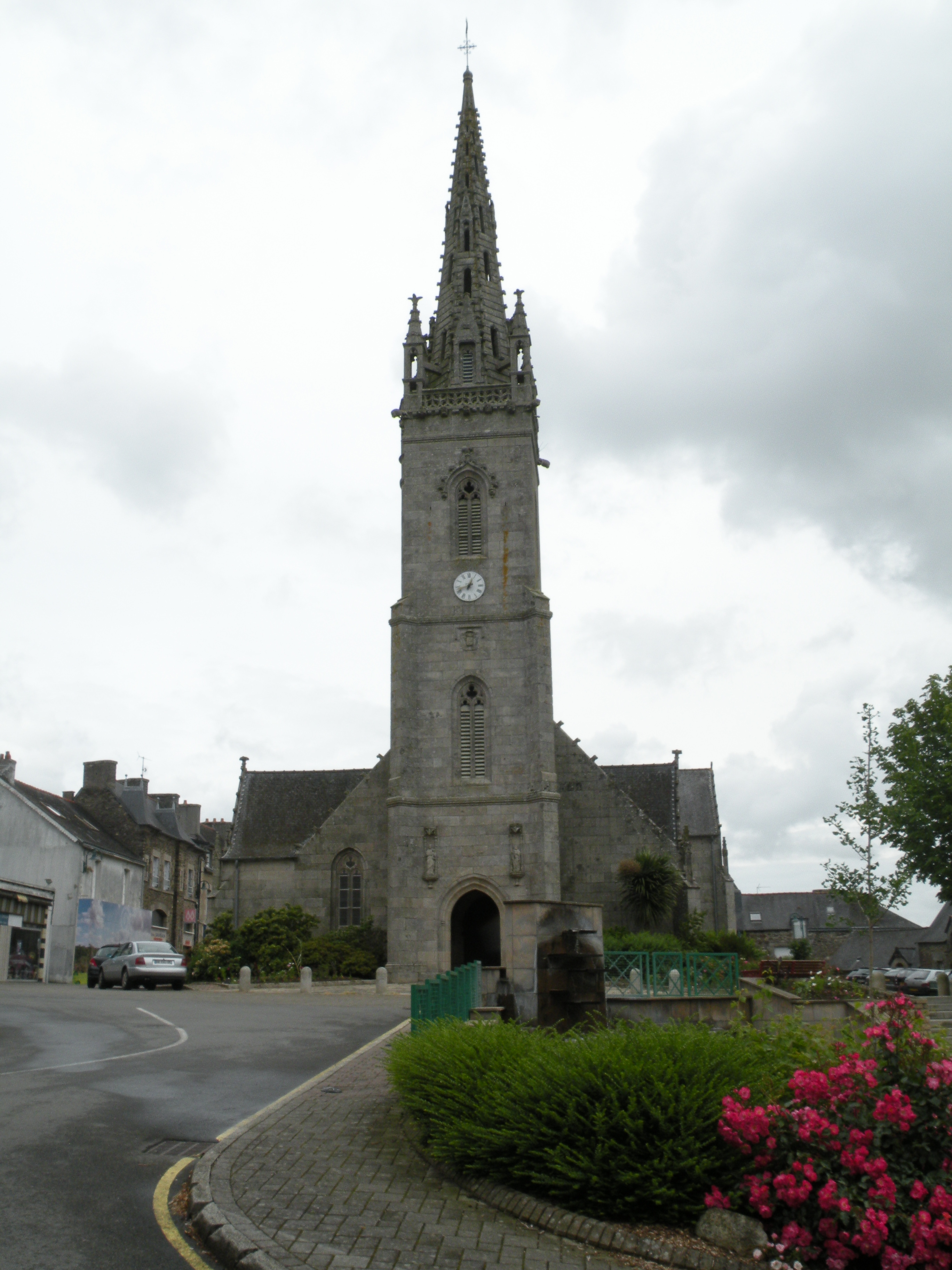 Église Saint-Pierre de Mûr-de-Bretagne.